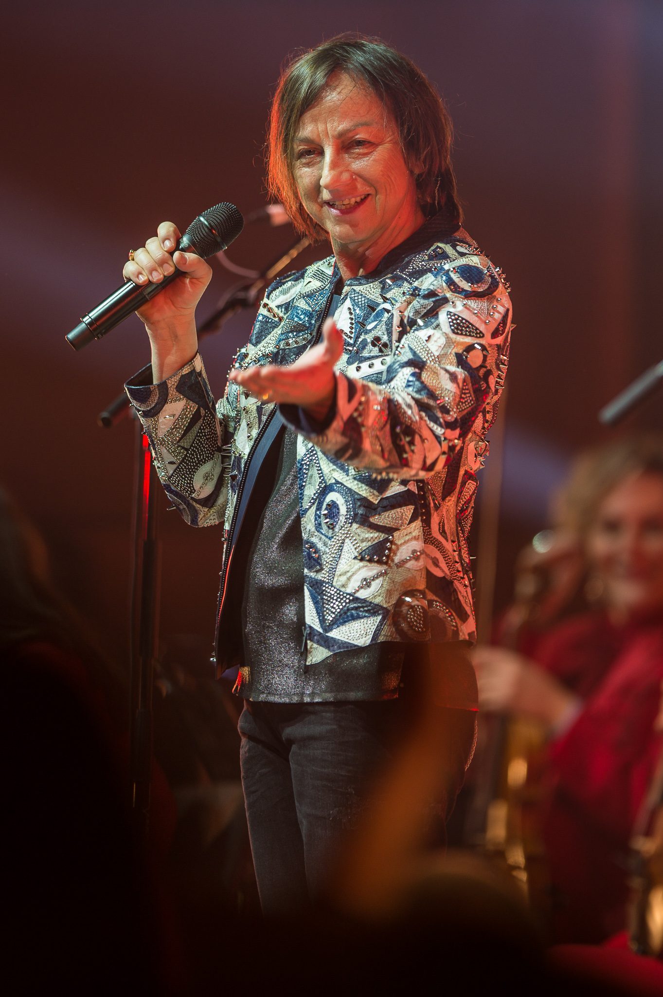 Concertbüro Franken,Gianna Nannini,Hitstory Tour 2017,Konzert,Livekonzert,Livemusik,Meistersingerhalle